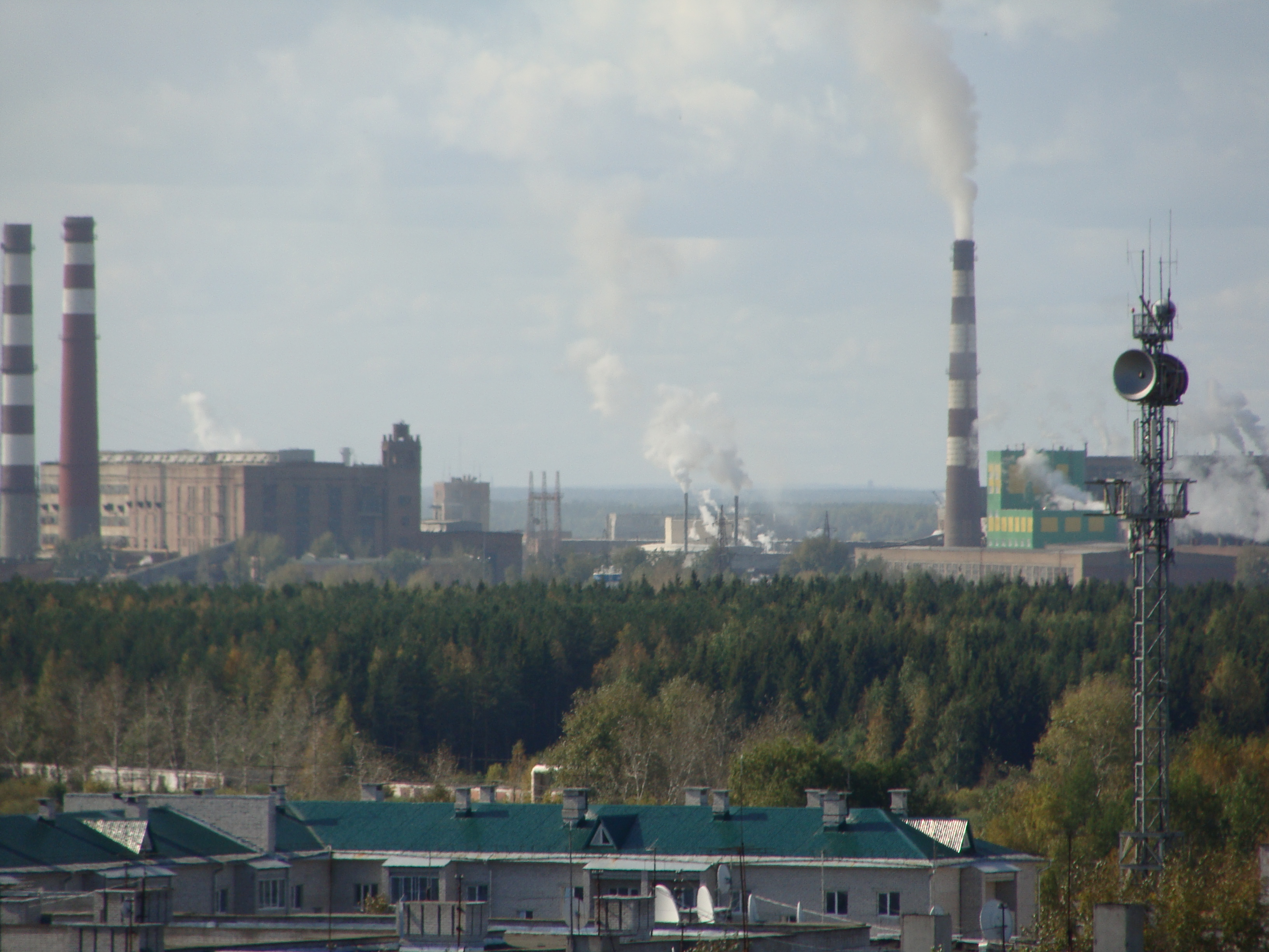 Котласский ЦБК ТЭЦ, завод НСПЦ